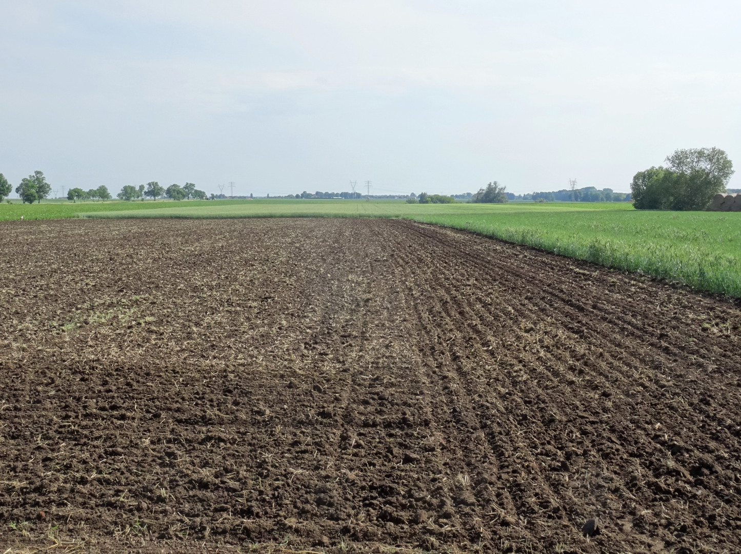 Tereny rolnicze w gminie Janikowo